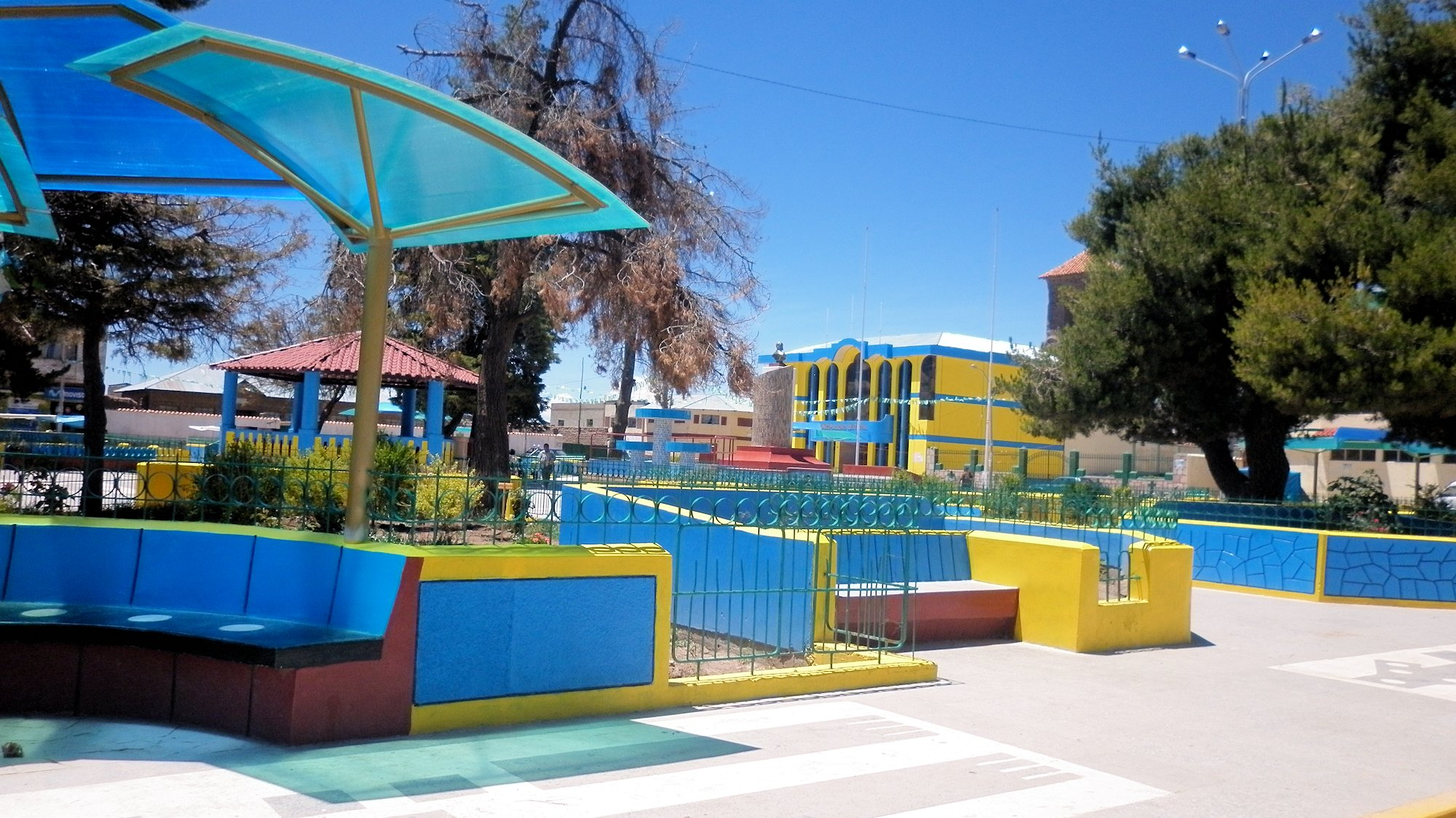 Plaza principal de Taraco.